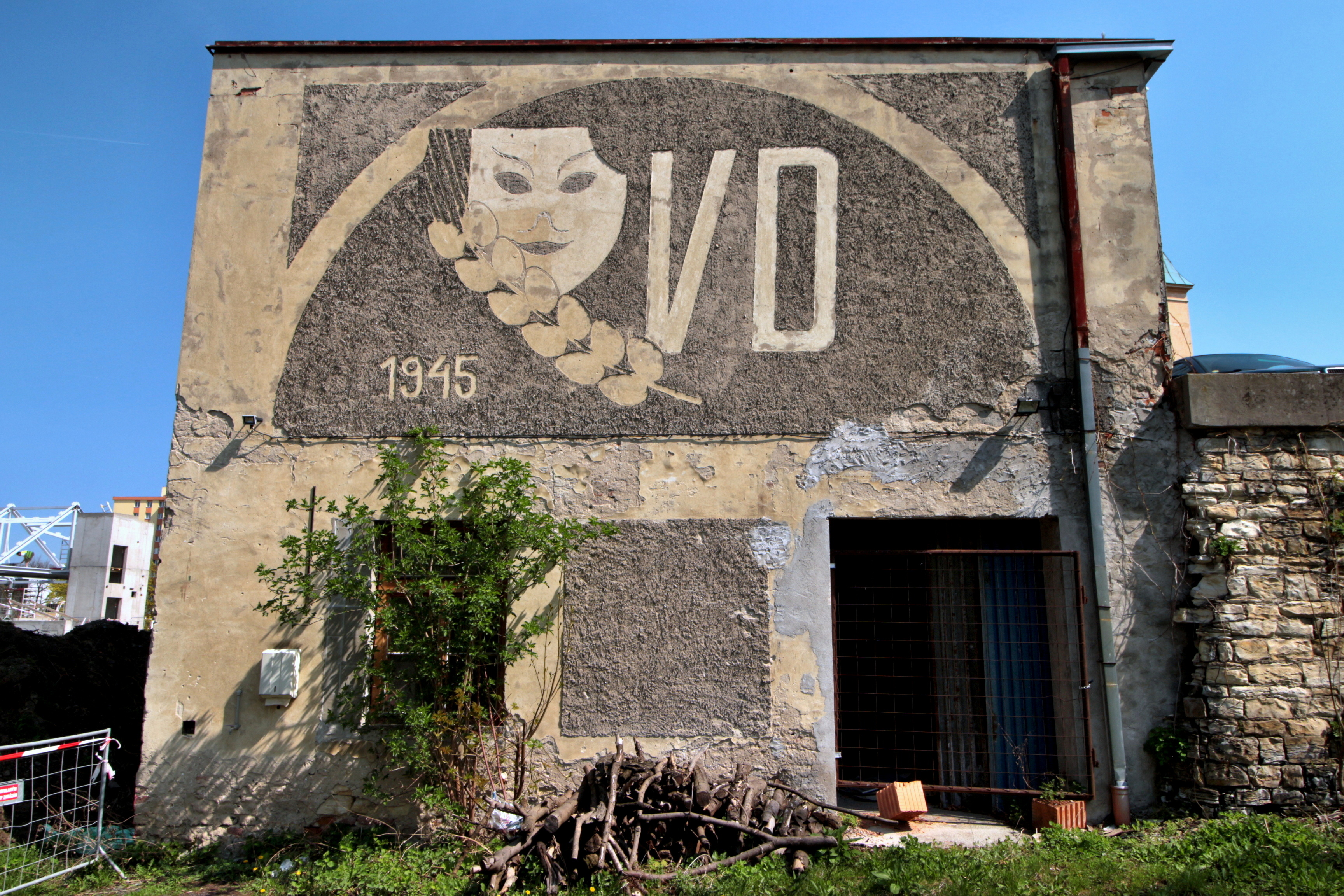 Hloubětínský zámek, Vesnické divadlo